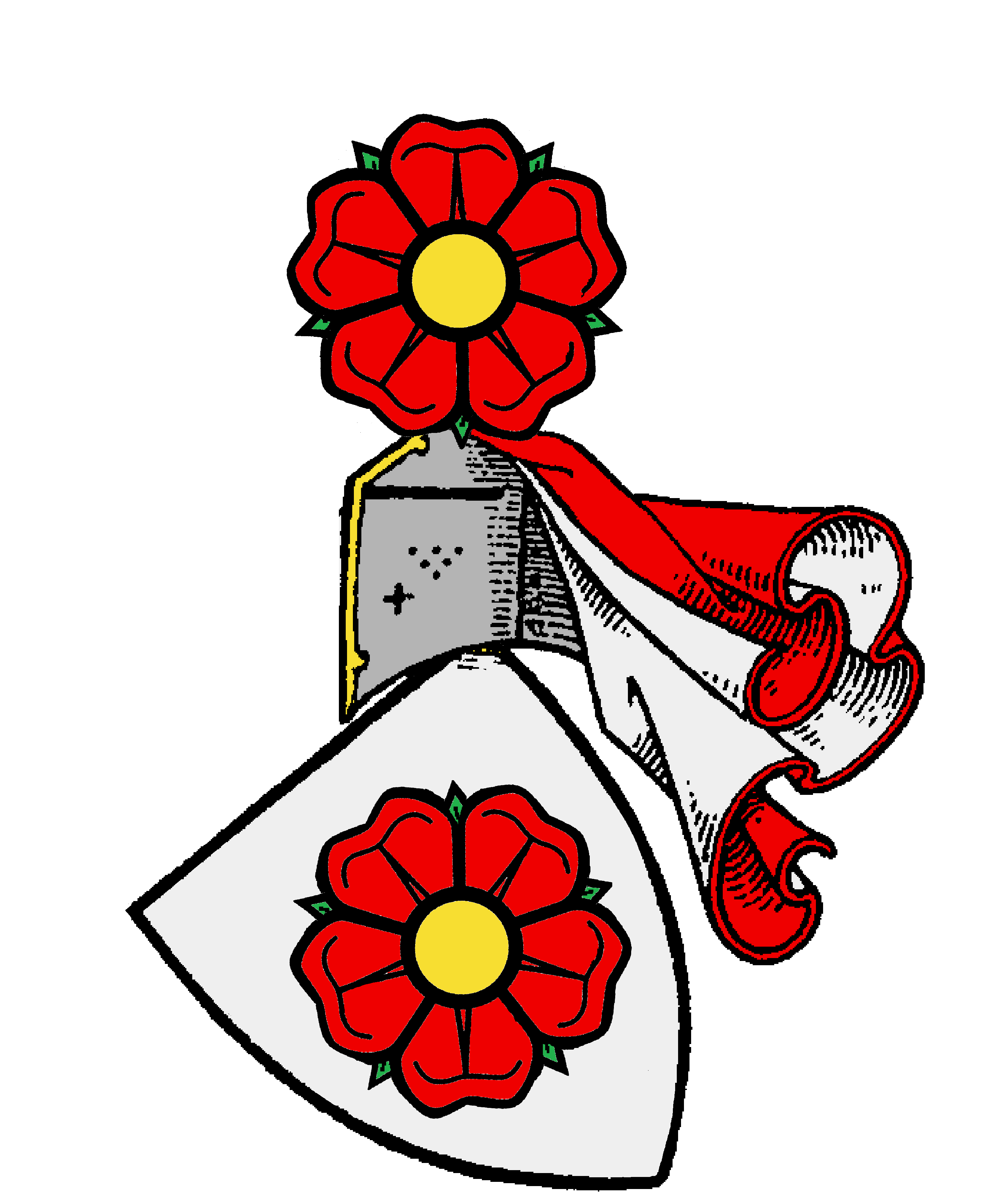 Původní znak pánů z Rožmberka (1250-1556)